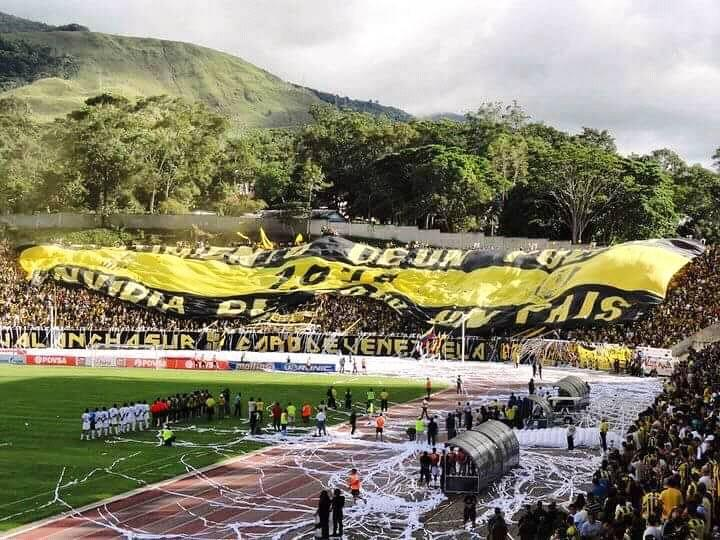 Sentimiento de Un Pueblo Envidia de Todo Un Pais